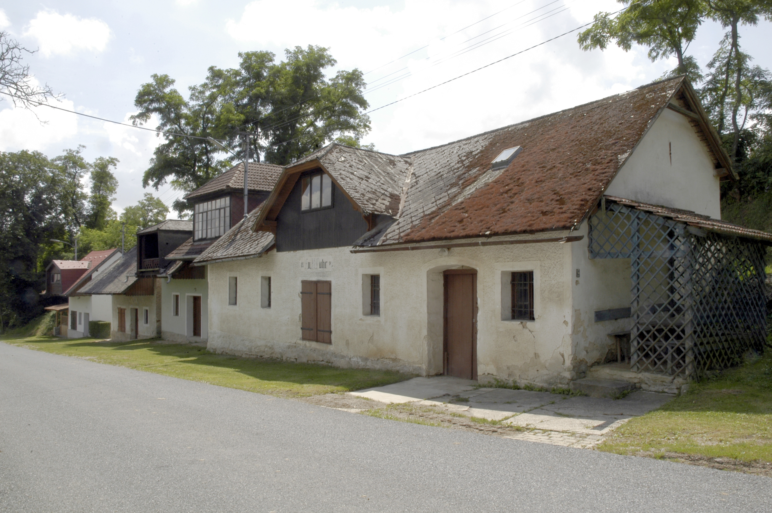 Kellergasse Rosenau in Obermarkersdorf, Gemeinde Schrattenthal,Niederösterreich